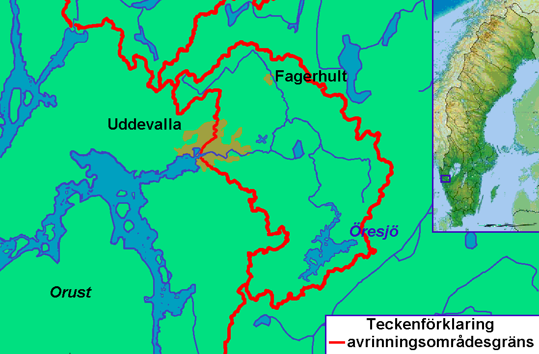 Карта річки Бевеон на півдні Швеції у лені Вестра-Йоталанд шведською мовою. Для створення карти використано карту File:Map of the river Bäveån – UK – Карта річки Бевеон.gif.